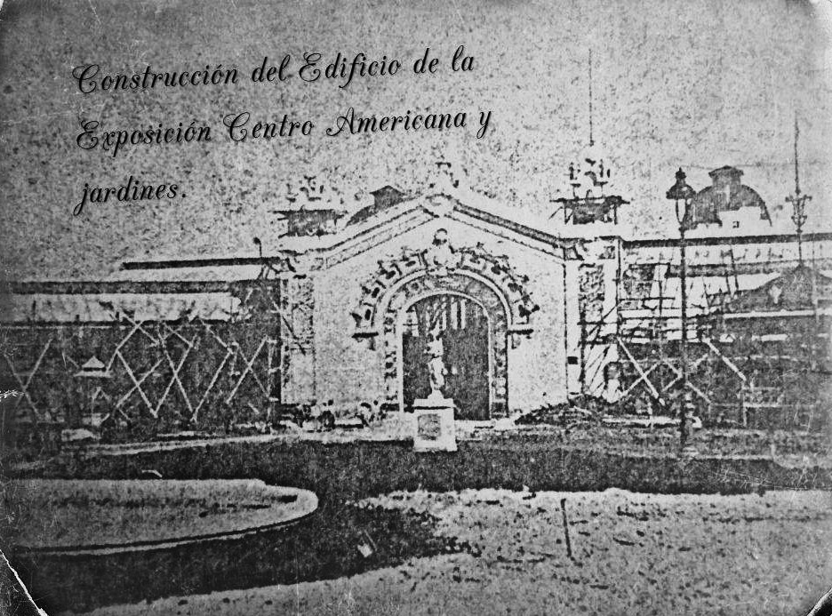 Exposición centroamericana de 1897.